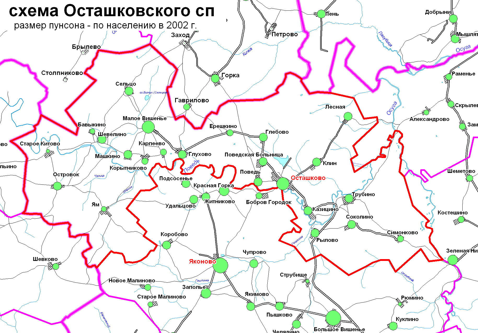 Схема Осташковского сп в Торжокском р-не